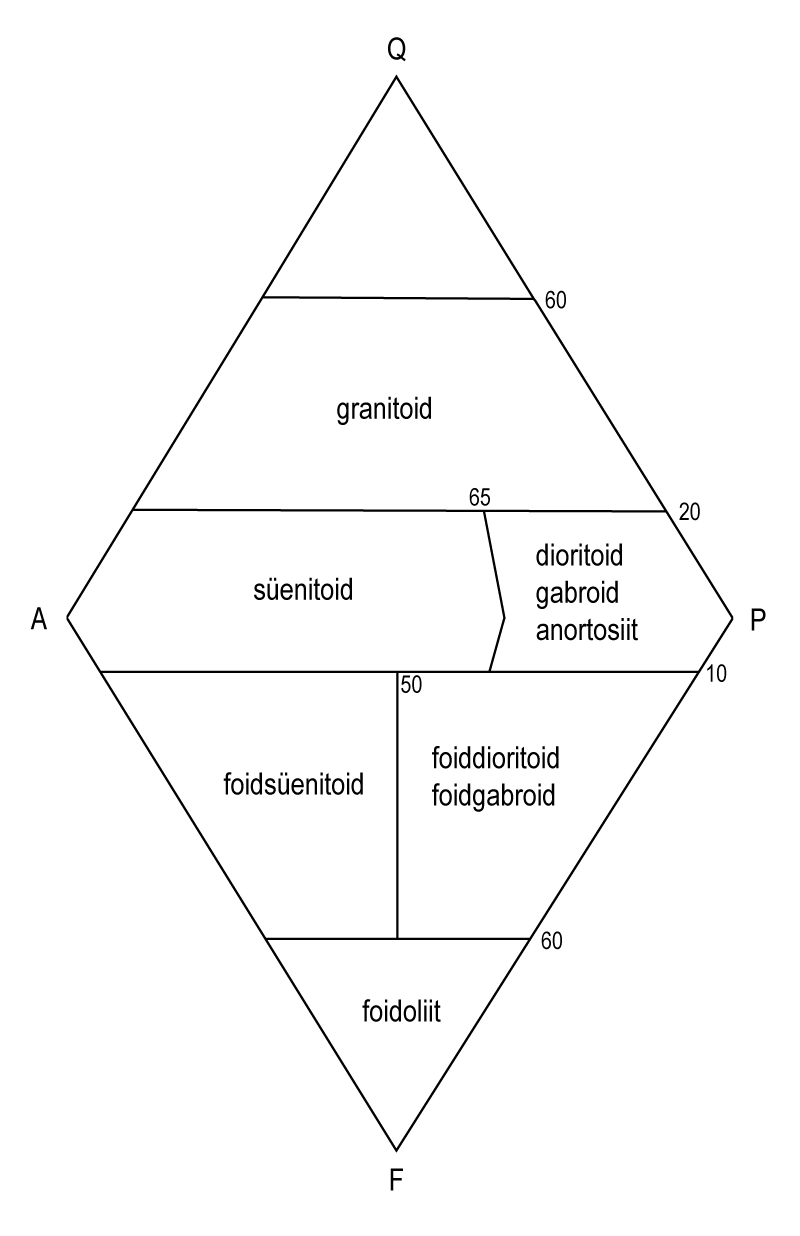 QAPF-diagramm, süvakivimite väliklassifikatsioon